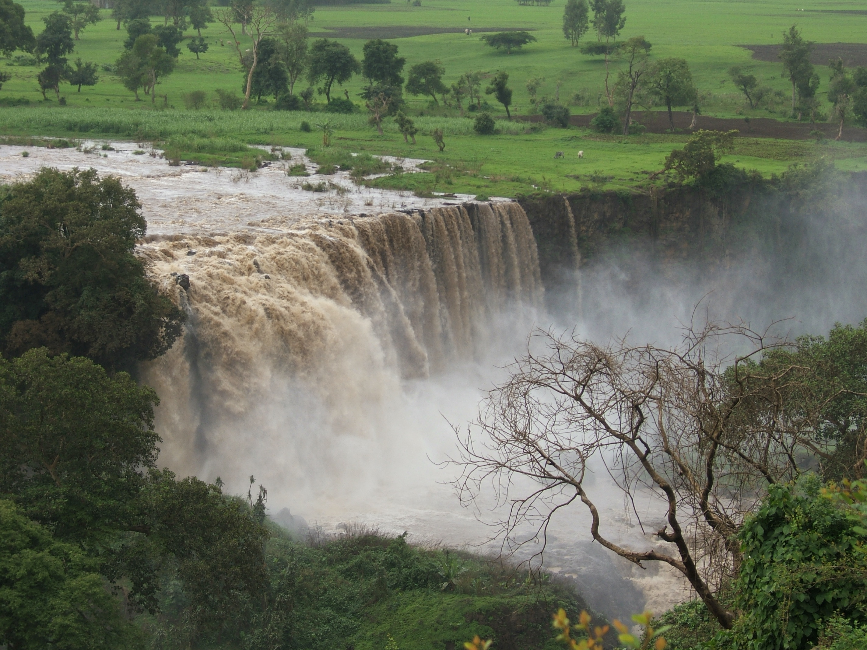 Blue Nile Falls